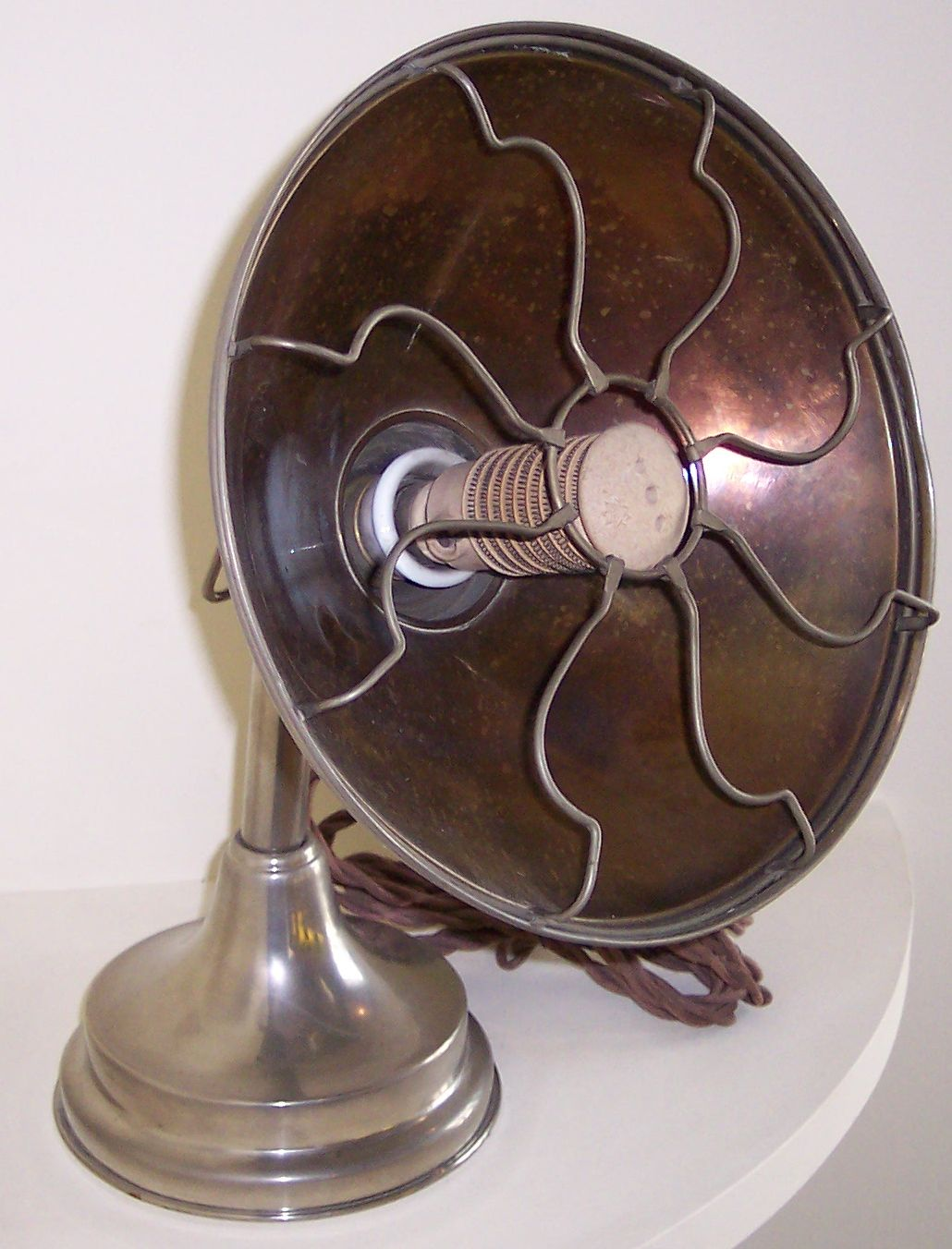 Radial Heizstrahler, auch Heizsonne genannt, eigenes Foto